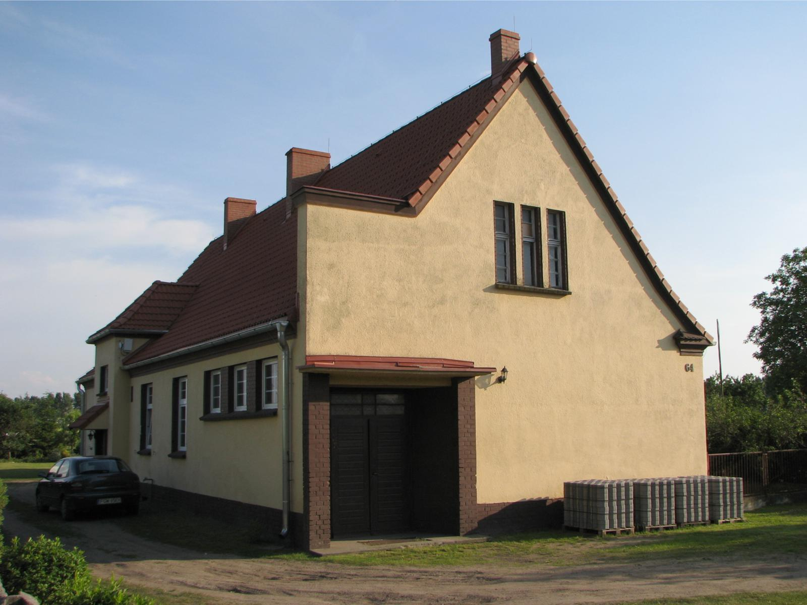 Wojcieszyce. Przedwojenna szkoła